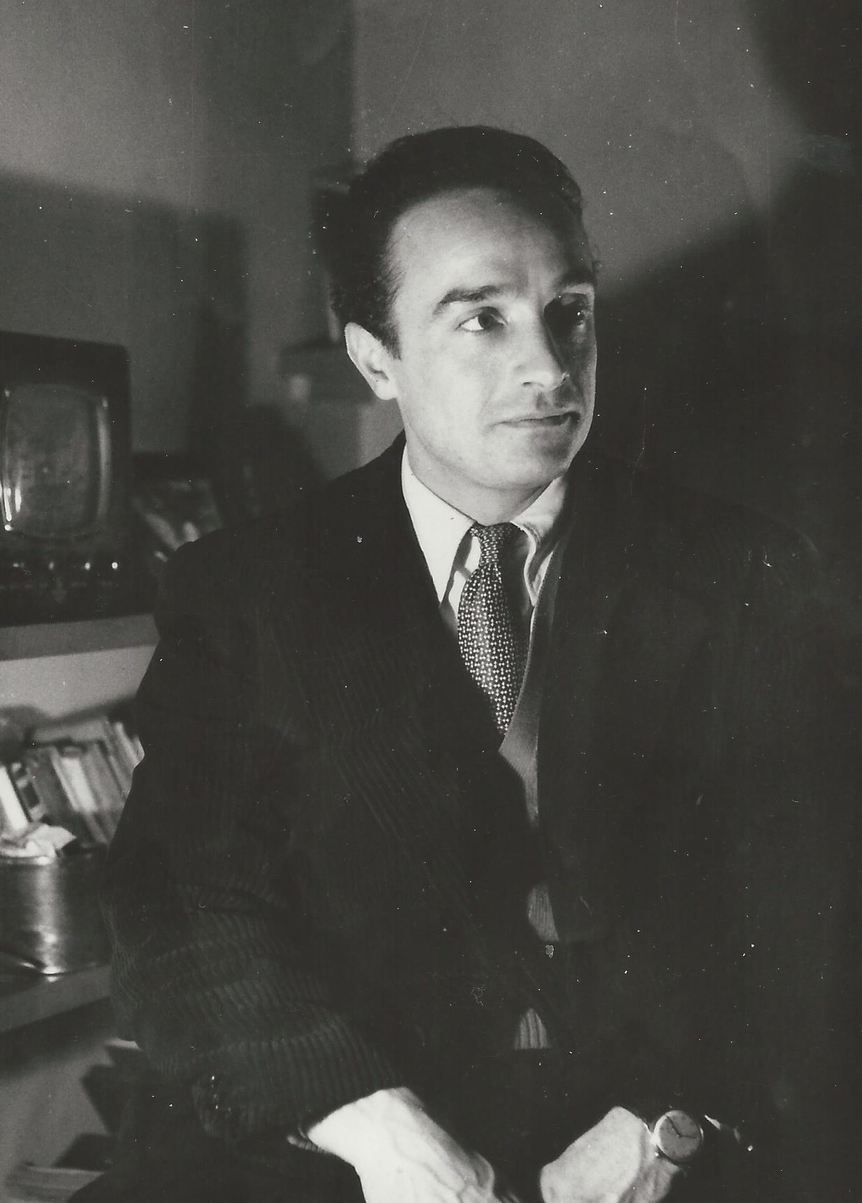 Pierre Méré en 1945